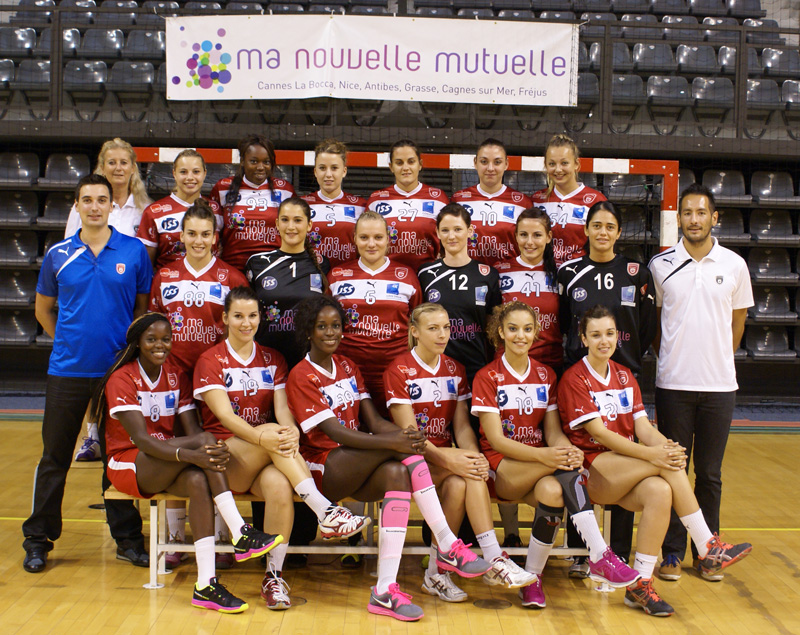 photo-equipe-2013-2014 D2F AS Cannes Handball